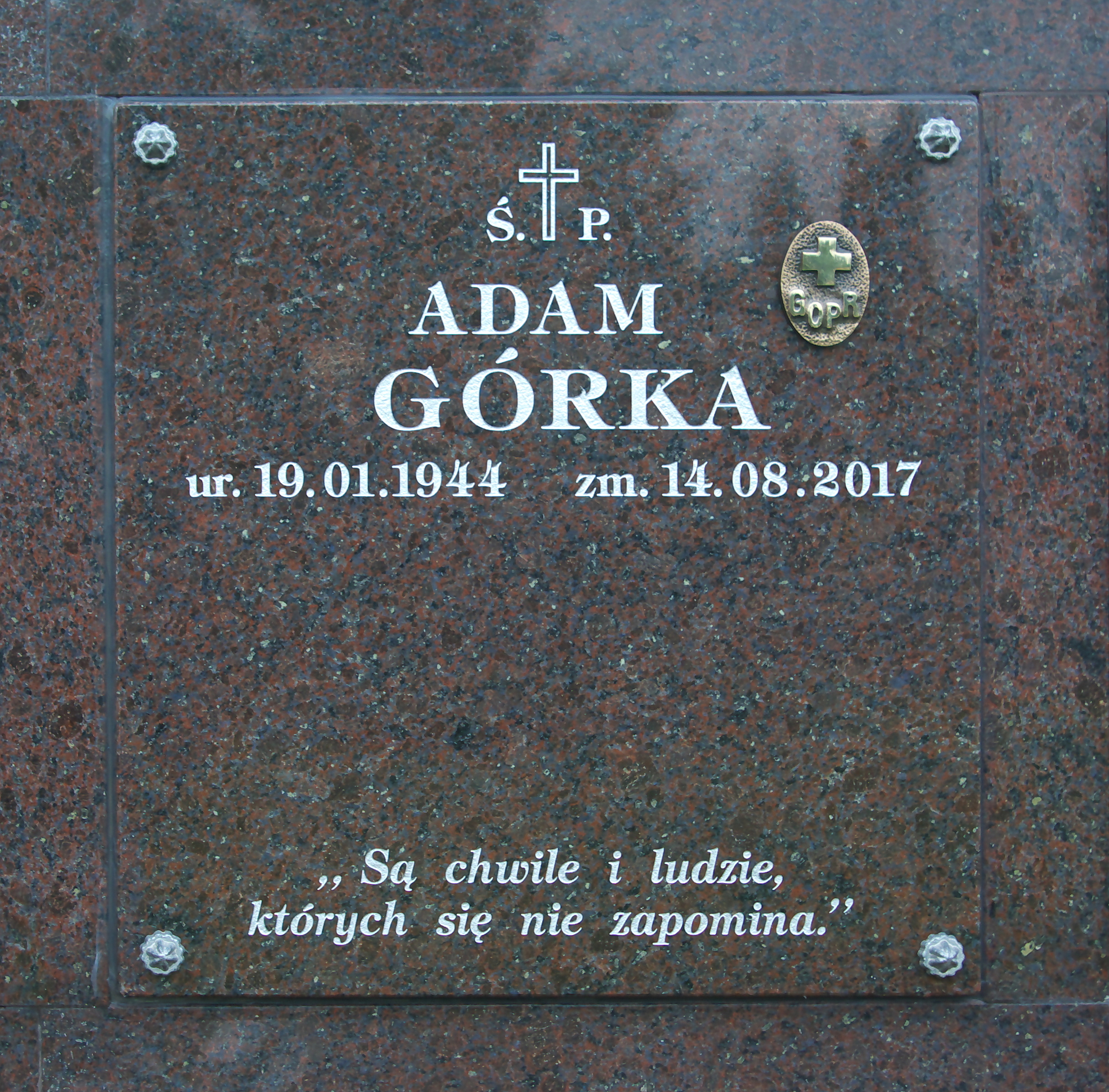 Miejsce pochówku prochów Adama Górki na Cmentarzu Centralnym w Sanoku (kolumbarium).